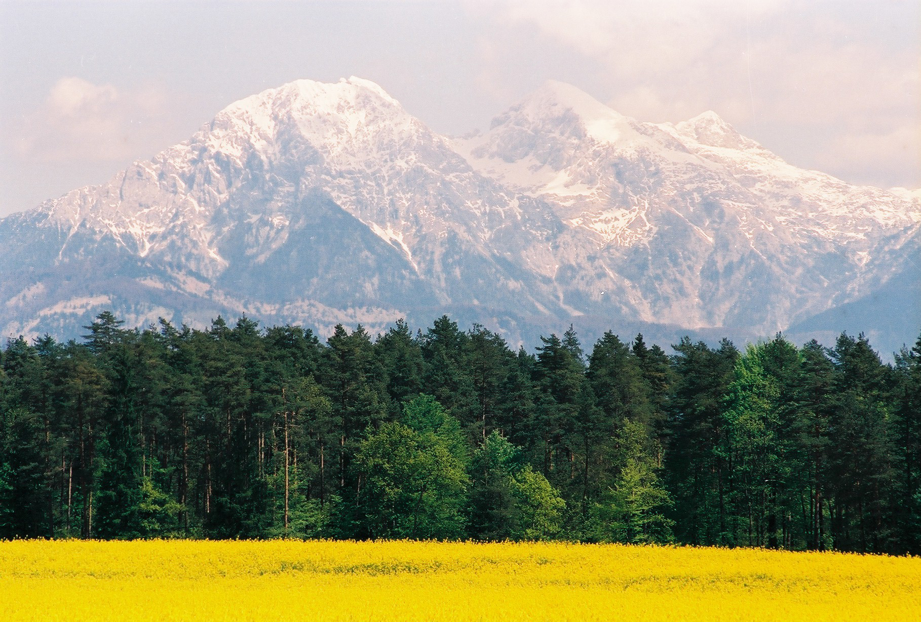 Sorško polje, v ozadju Kočna in Grintovec.